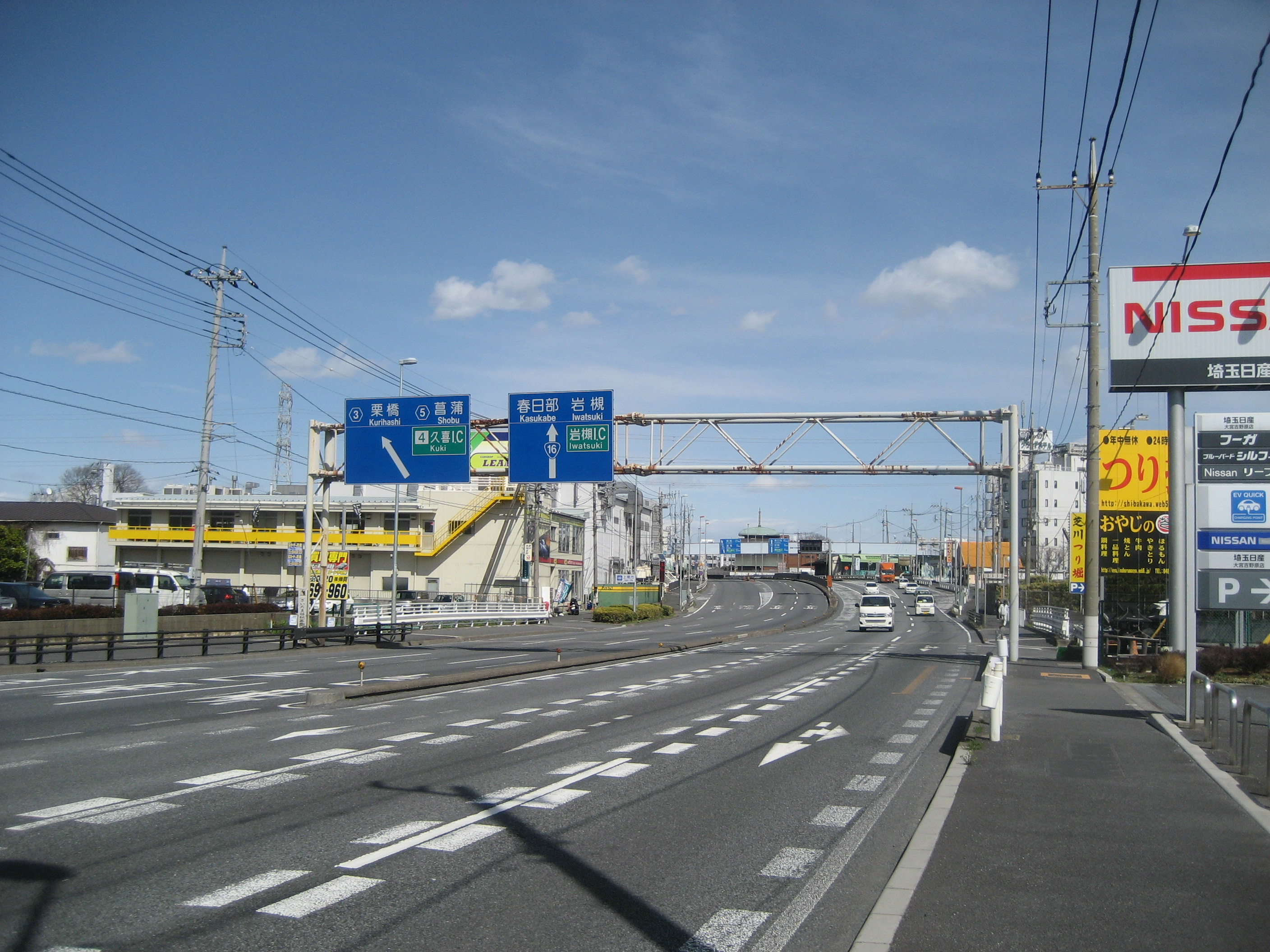 国道16号線（東大宮バイパス）さいたま市北今羽町付近（埼玉県道さいたま栗橋線との分岐付近）